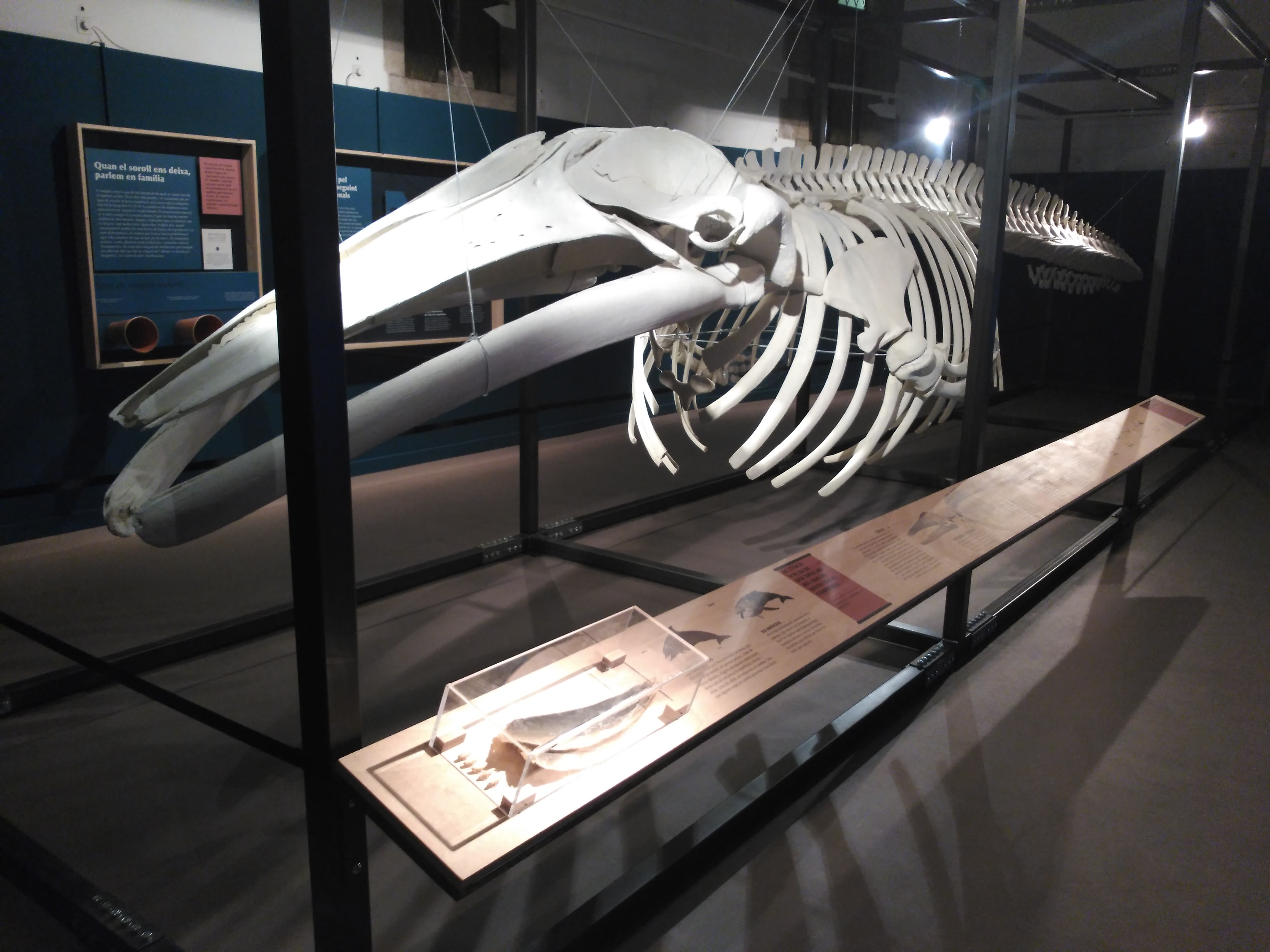 L'esquelet de la balena de Mataró es va tornar a muntar l'any 2017 per a una exposició temporal que commemorava el 40 aniversari de la troballa.